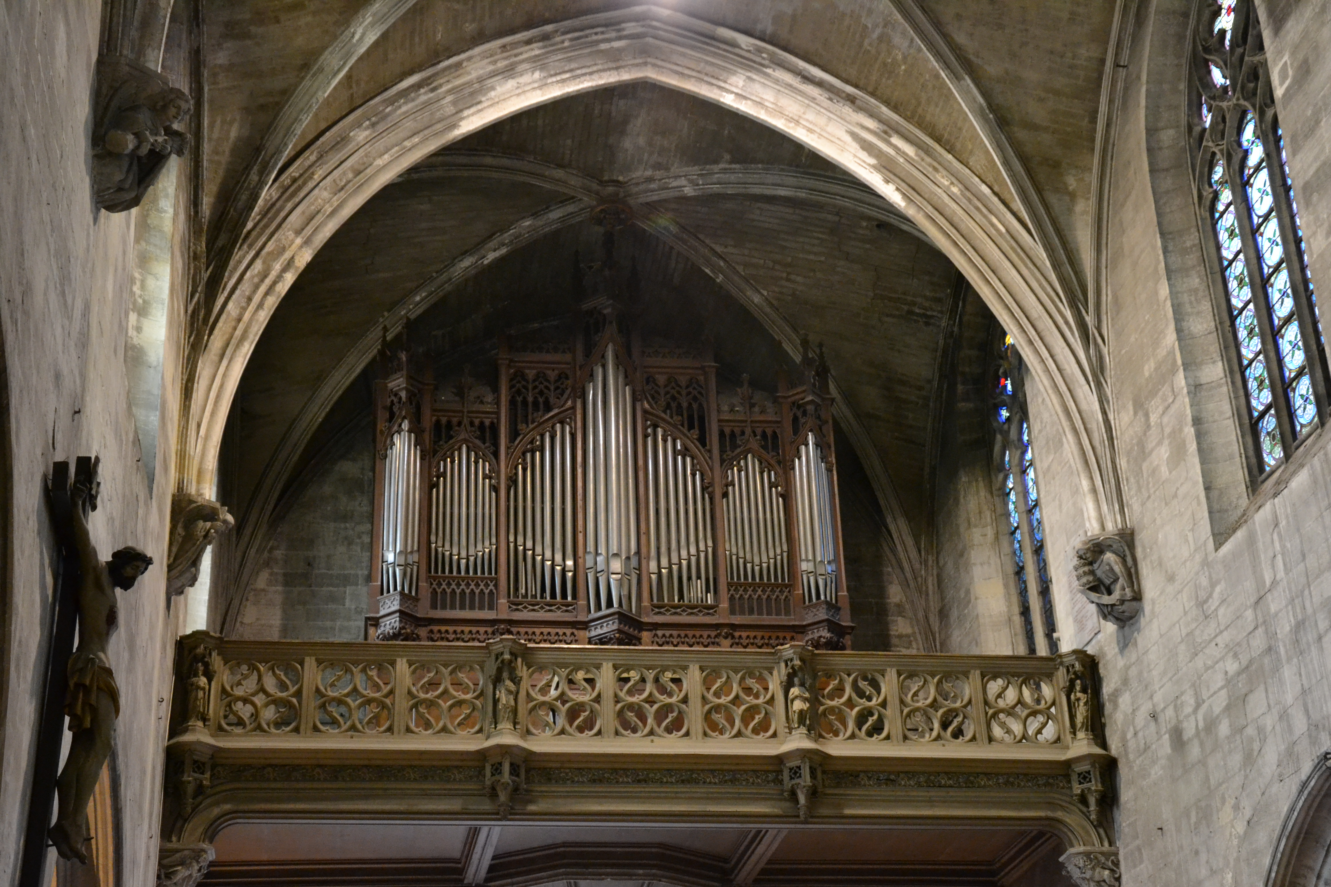 Collégiale Saint-Pierre (Classé)